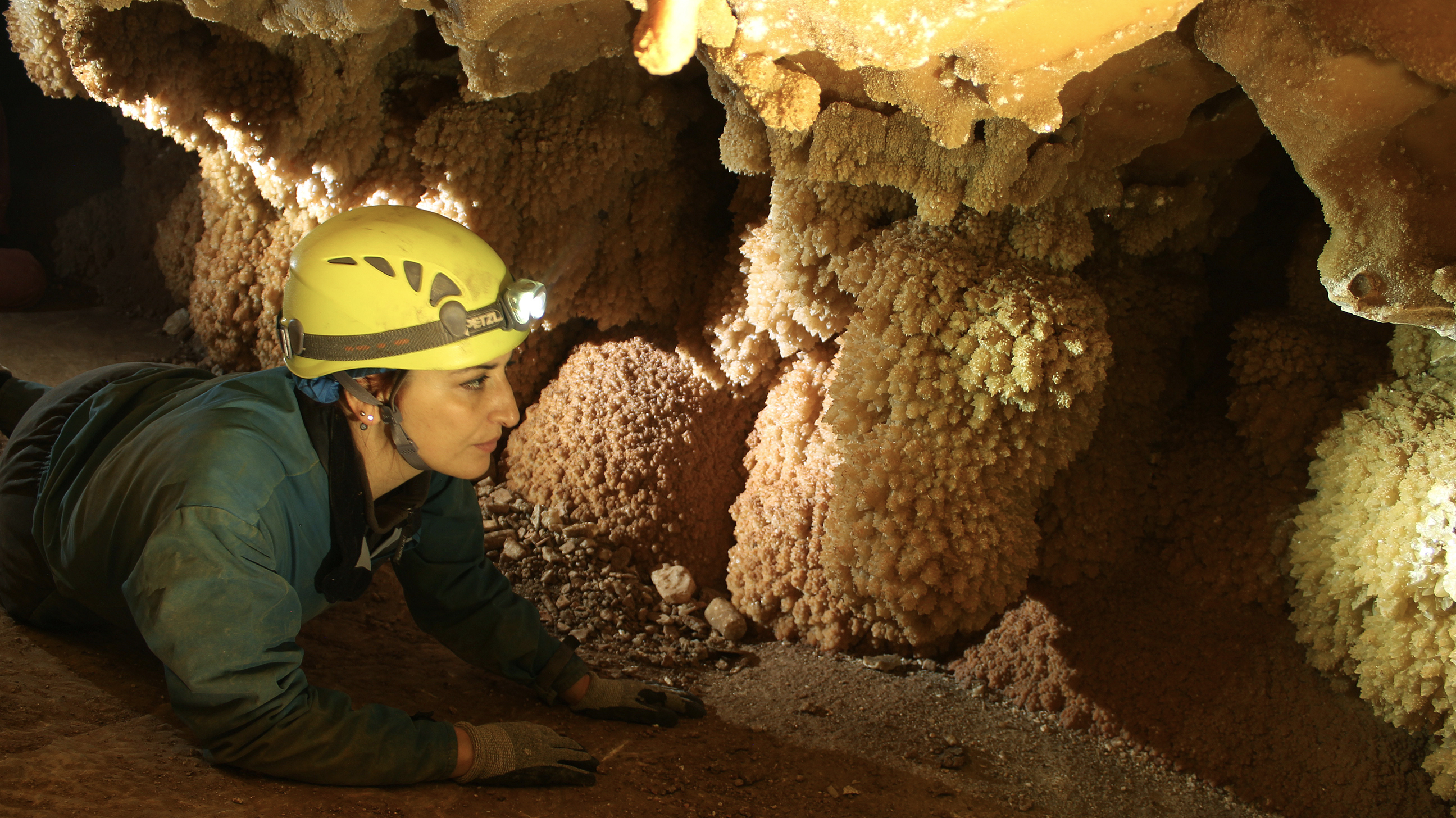 Formazione di coralloidi in una grotta della Puglia